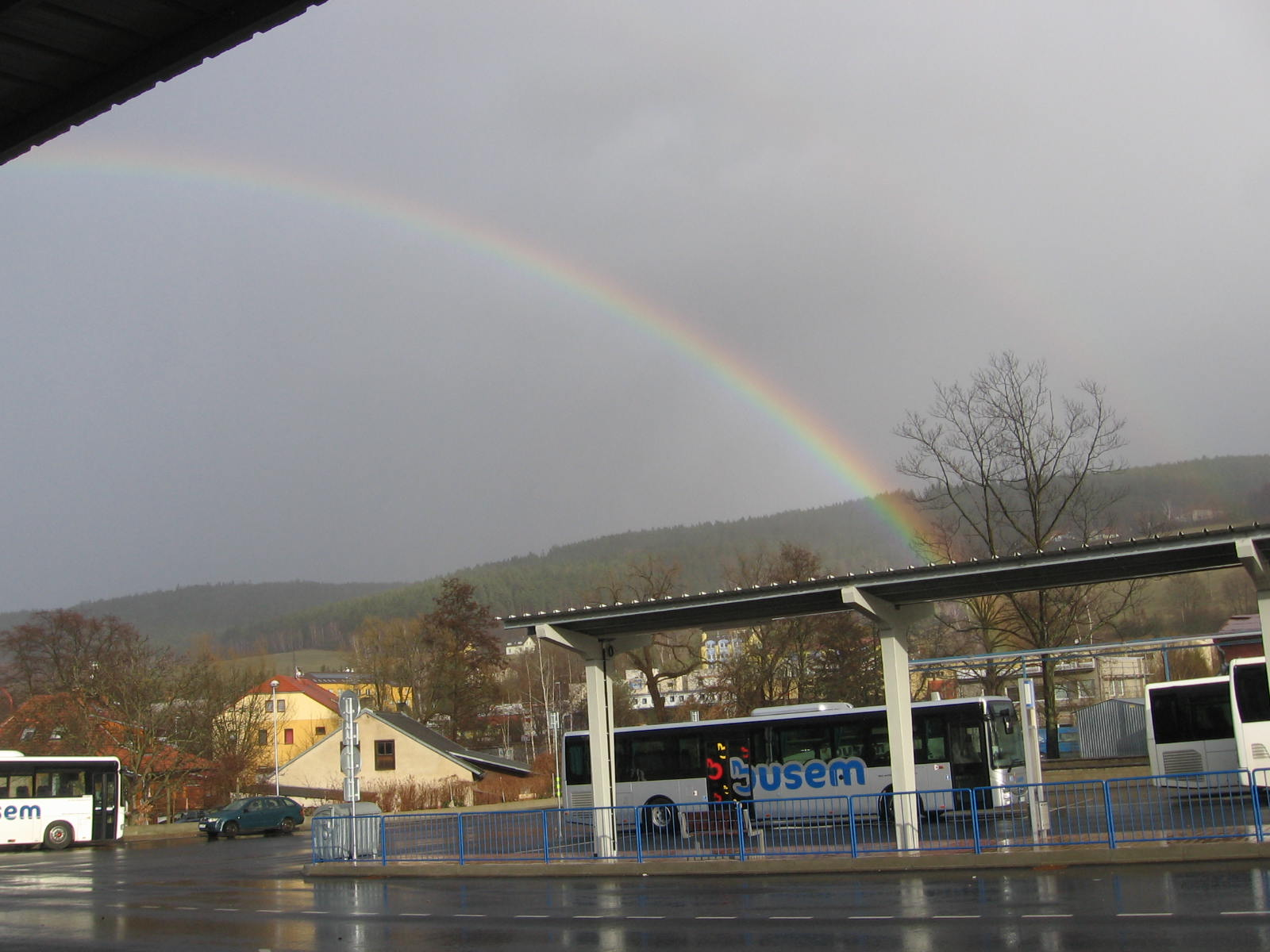 Autobusové nádraží v Prachaticích, autobusy, duha po dešti